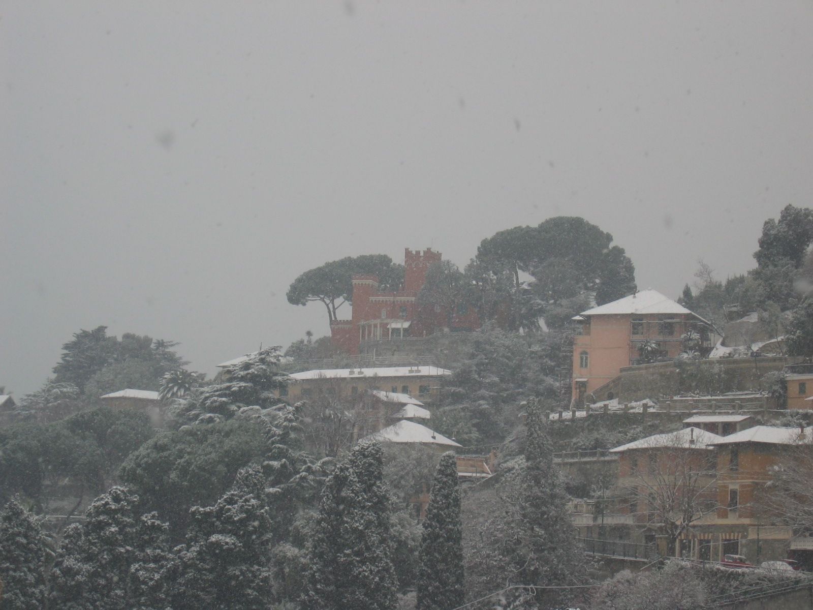 Una delle residenze private più pregevoli della delegazione.